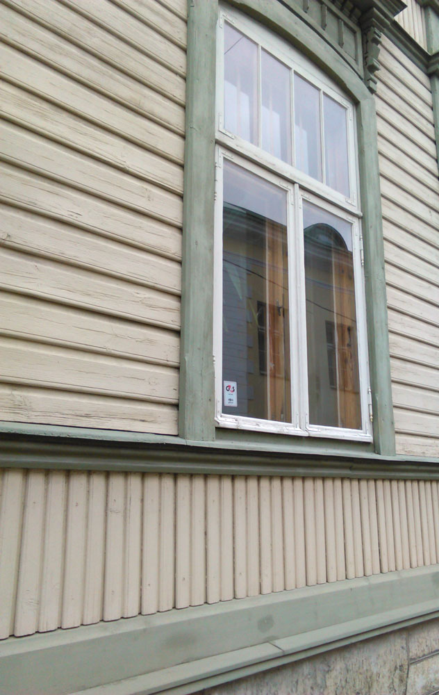 Horisontaal- ja vertikaallaudis. Tatari 21a, Tallinn